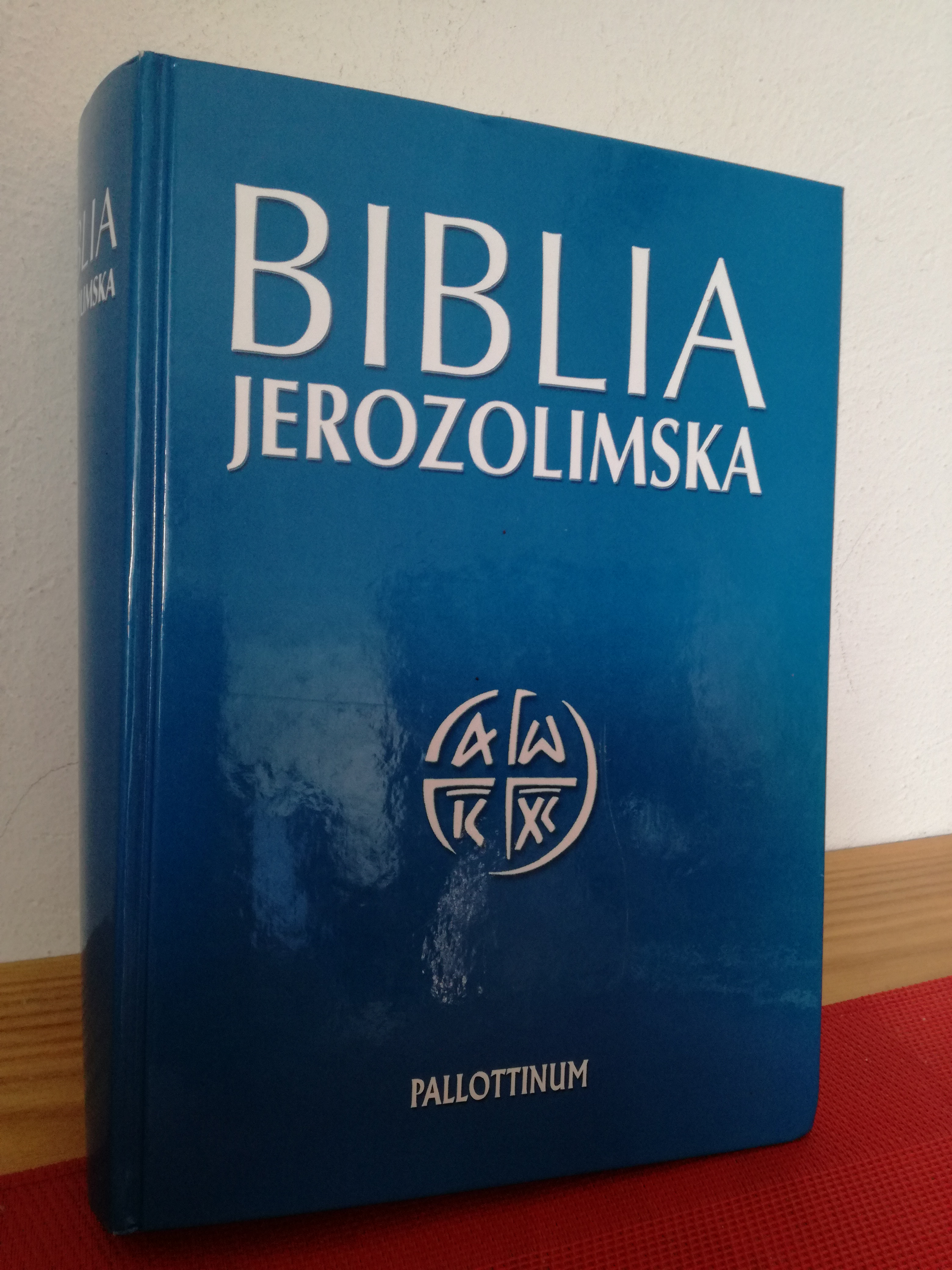 Biblia Jerozolimska w języku polskim. Wydanie pierwsze. Poznań 2006. Wydawnictwo Pallottinum.